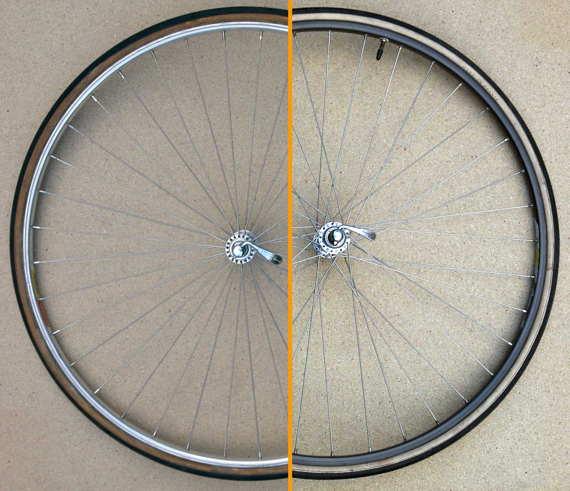 Vergleich radialer (links) und 3-fach gekreuzter Speichung (rechts)